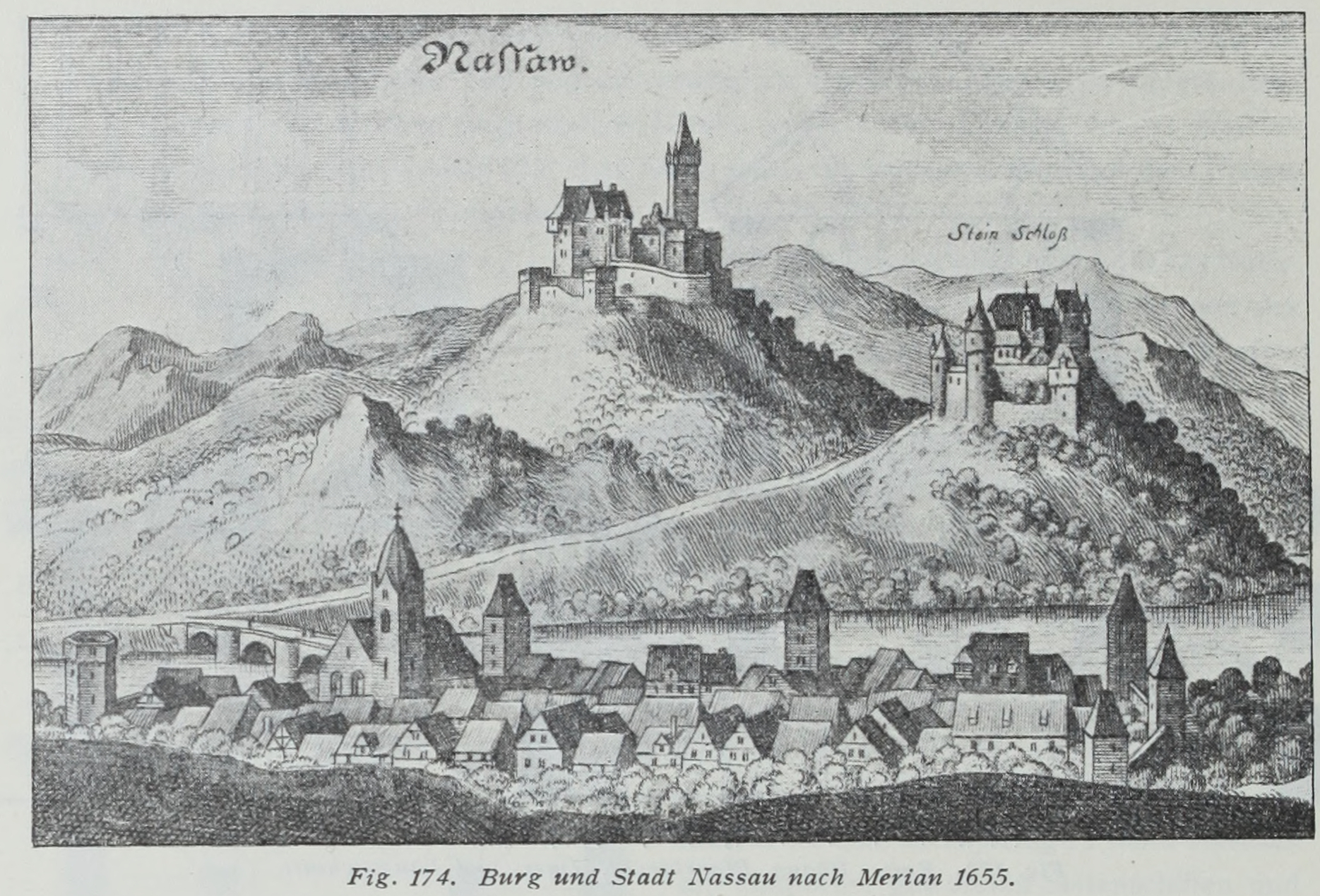 Burg und Stadt Nassau nach Merian 1655